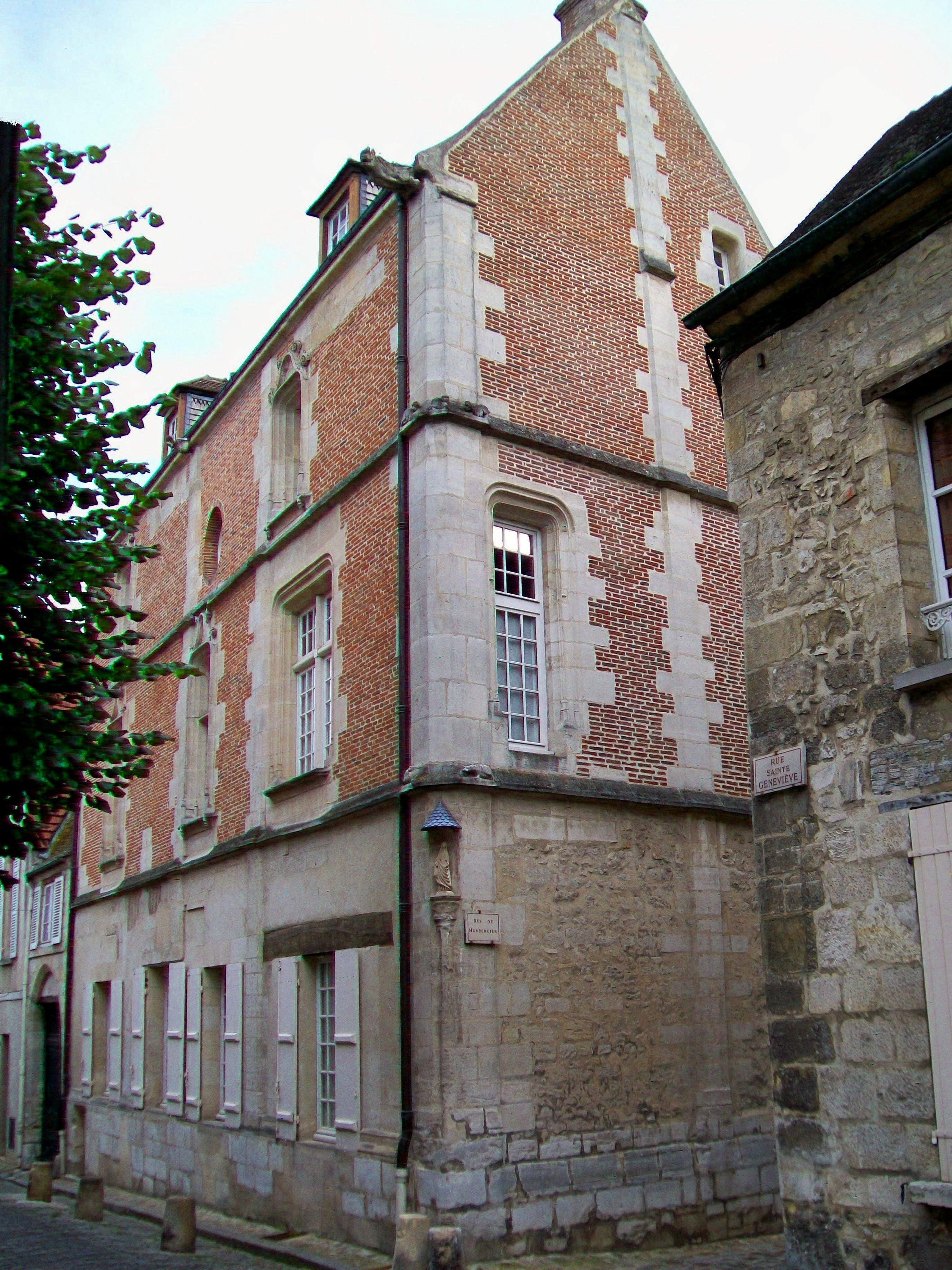 Le logis du Haubergier, à l'angle des rues Sainte-Geneviève et de la rue du Haubergier, façades nord et ouest.